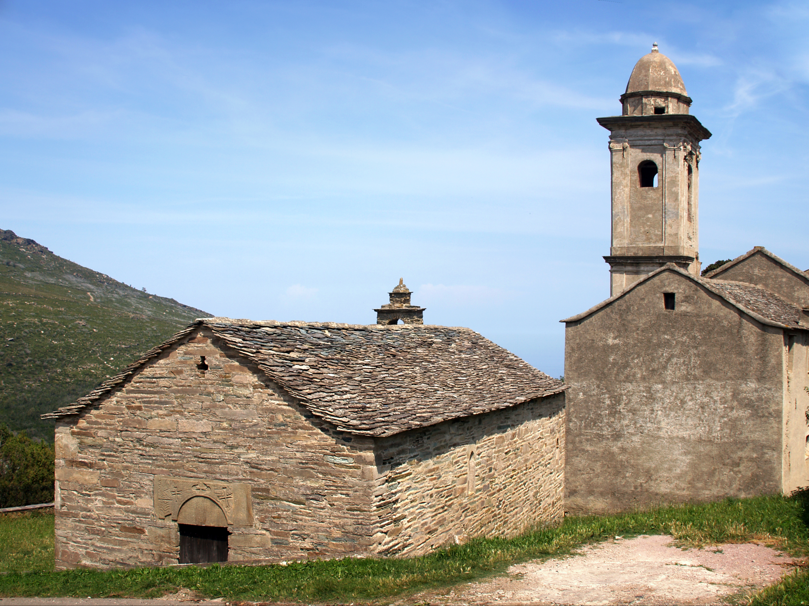 Corsu: Brandu, Cap Corse (Corsica) - A parte occidentale di a cappella Santa Maria delle Nevi è a chjesa Santa Maria Assunta di Parocchja - Castello